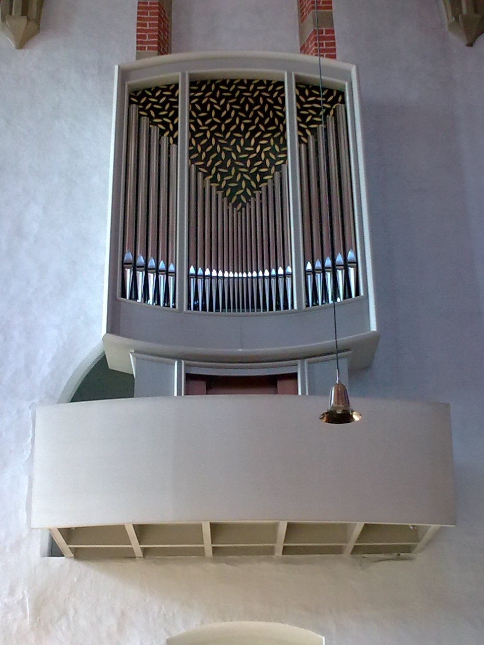 Eule-Orgel in der Klosterkirche St. Marienstern, Sachsen